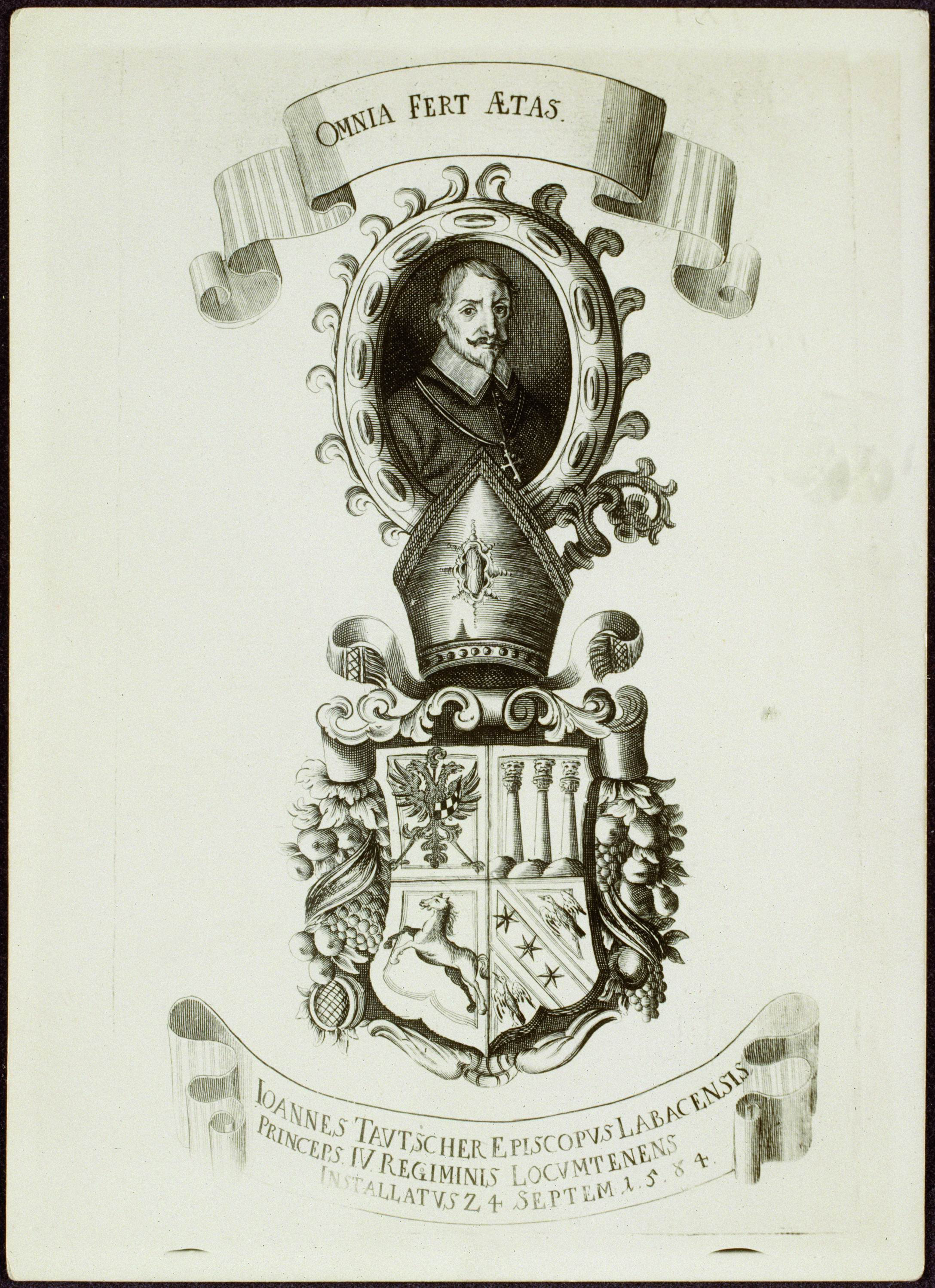 Janez Tavčar (1544-1597))